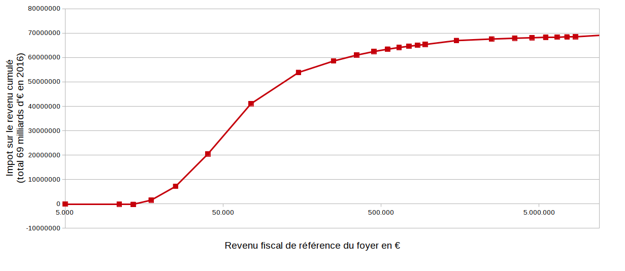 Impot sur le revenu cumulé 2016